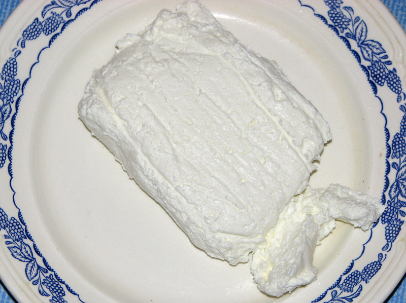 Творог